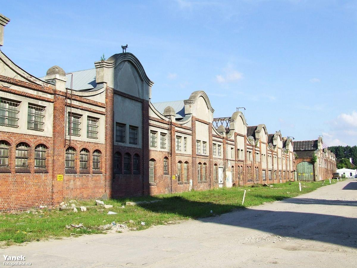 Hala naprawy wagonów. Widok od zachodu